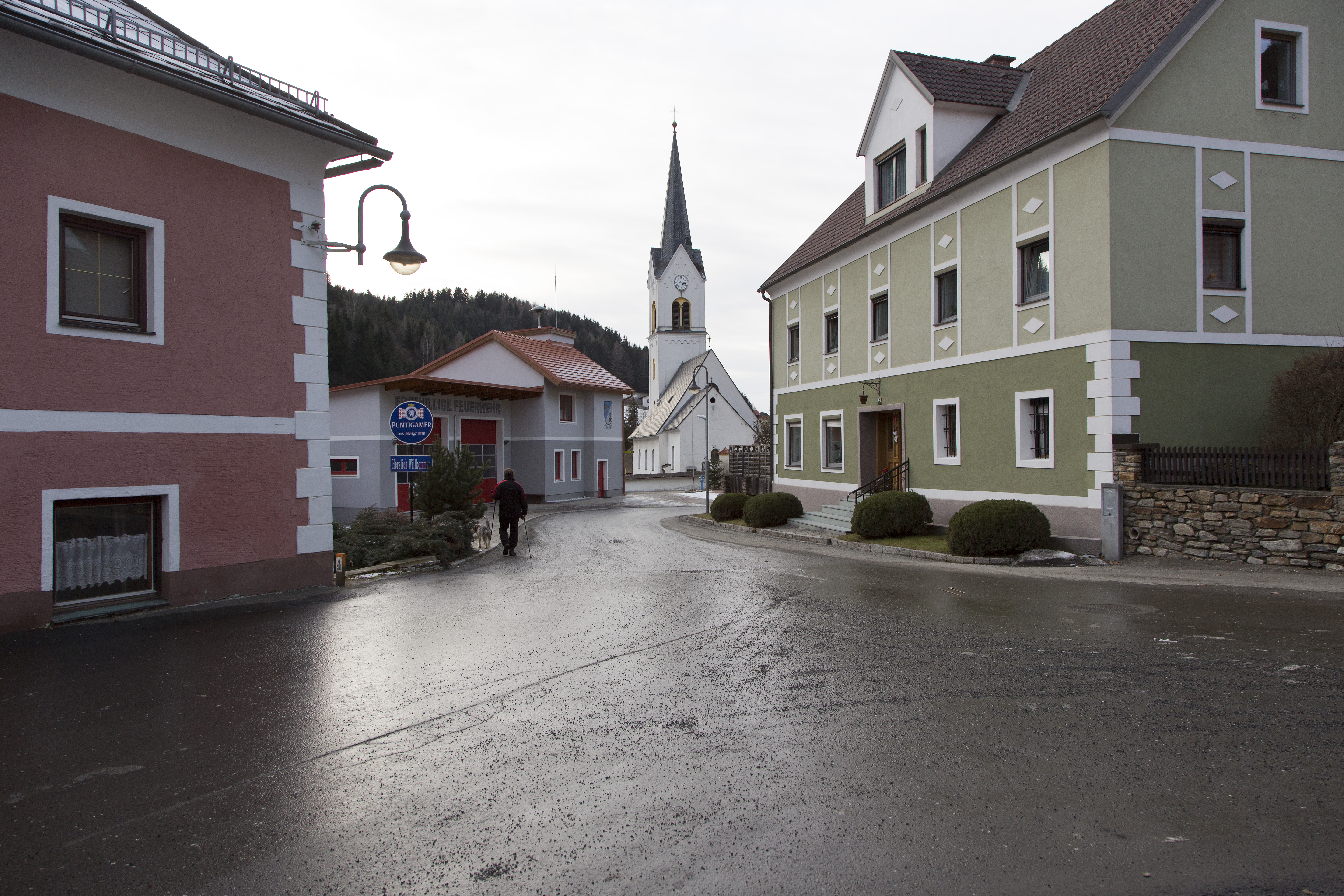 Rachau mit Feuerwehrgebäude und Pfarrkirche